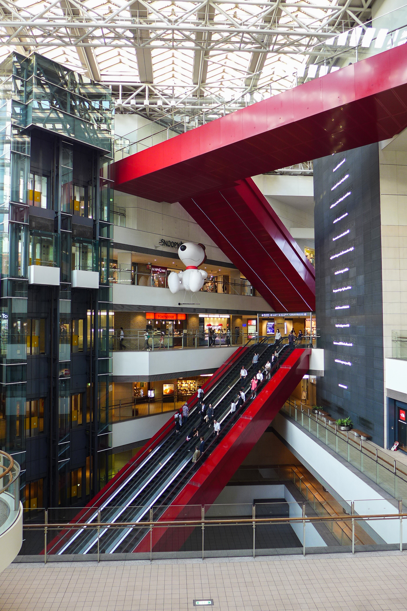 Queen's Square YOKOHAMA Atrium